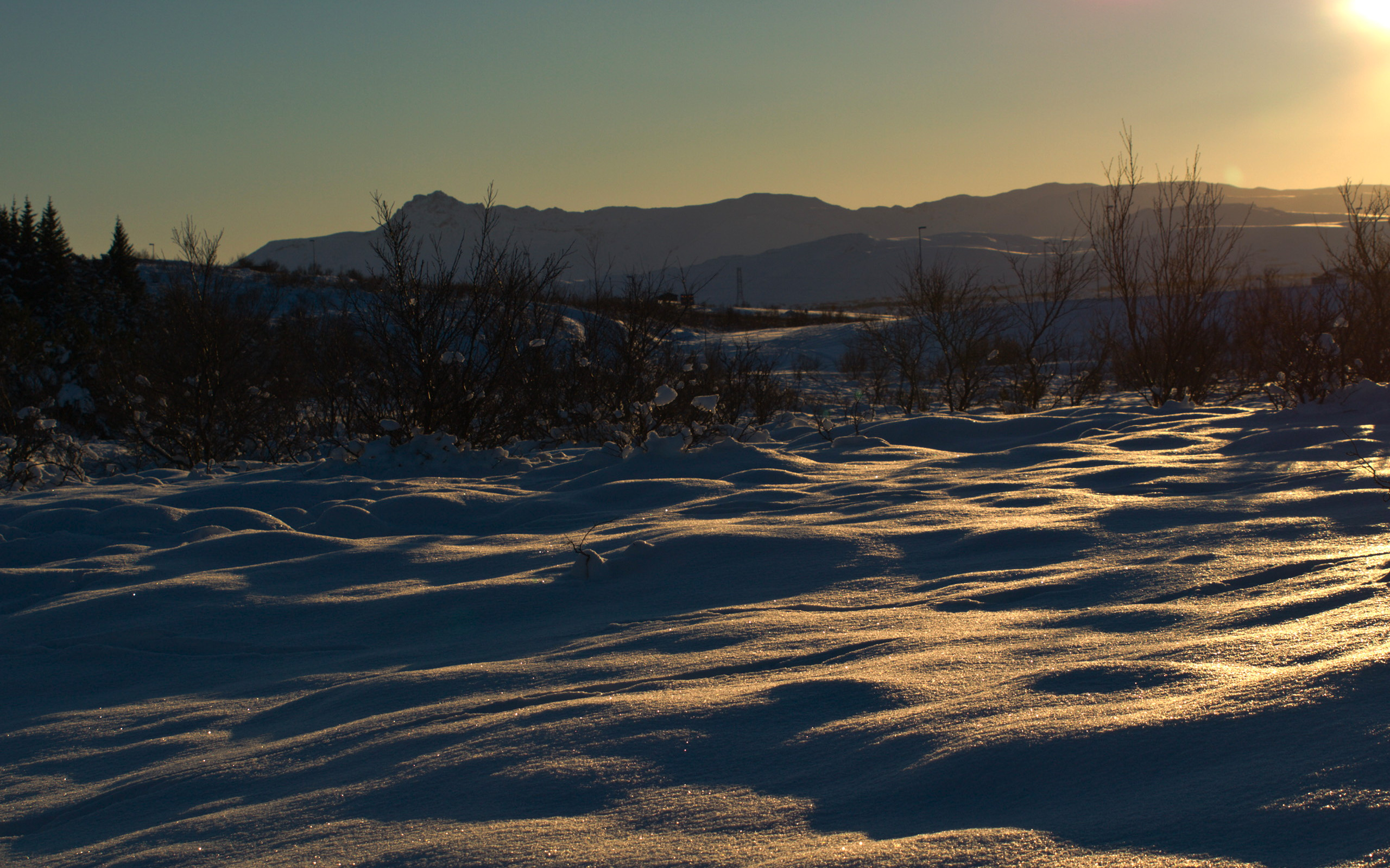 Rauðavatn